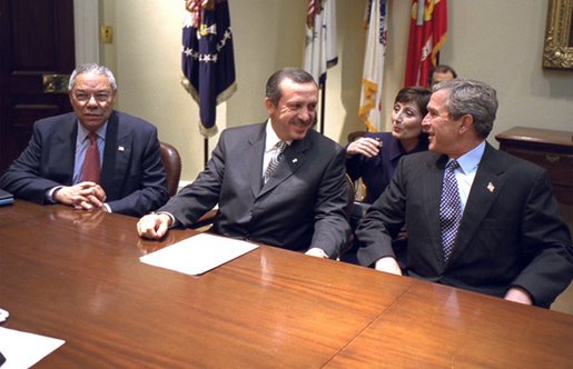 Erdogan en compagnie du président George Bush